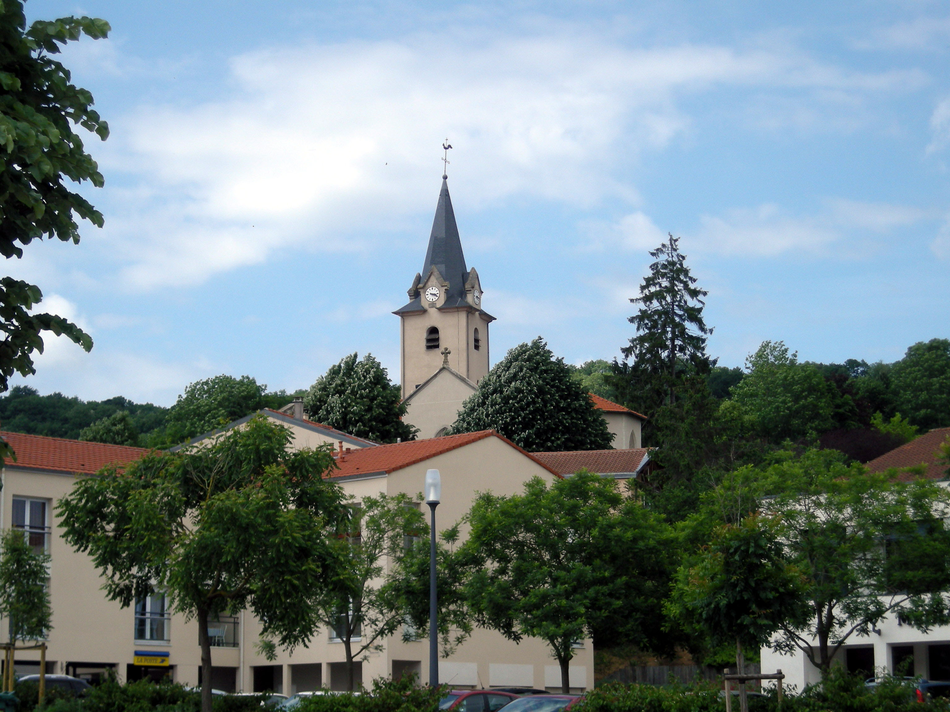 Église de Ludres (Meurthe-et-Moselle)